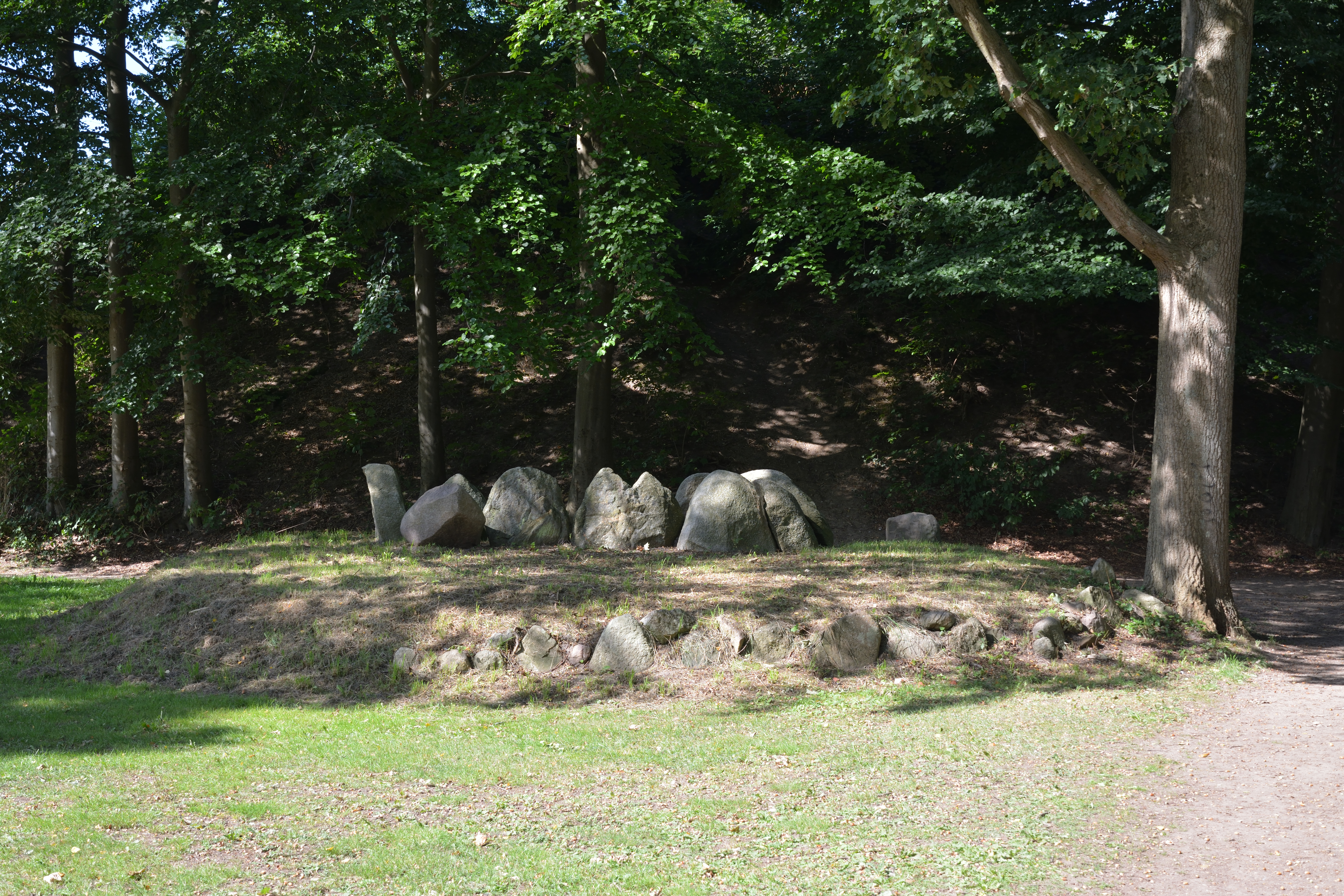 Fotos aus dem Inneren des "Germanengrabes", eines bronzezeitlichen Grabhügels in Itzehoe.